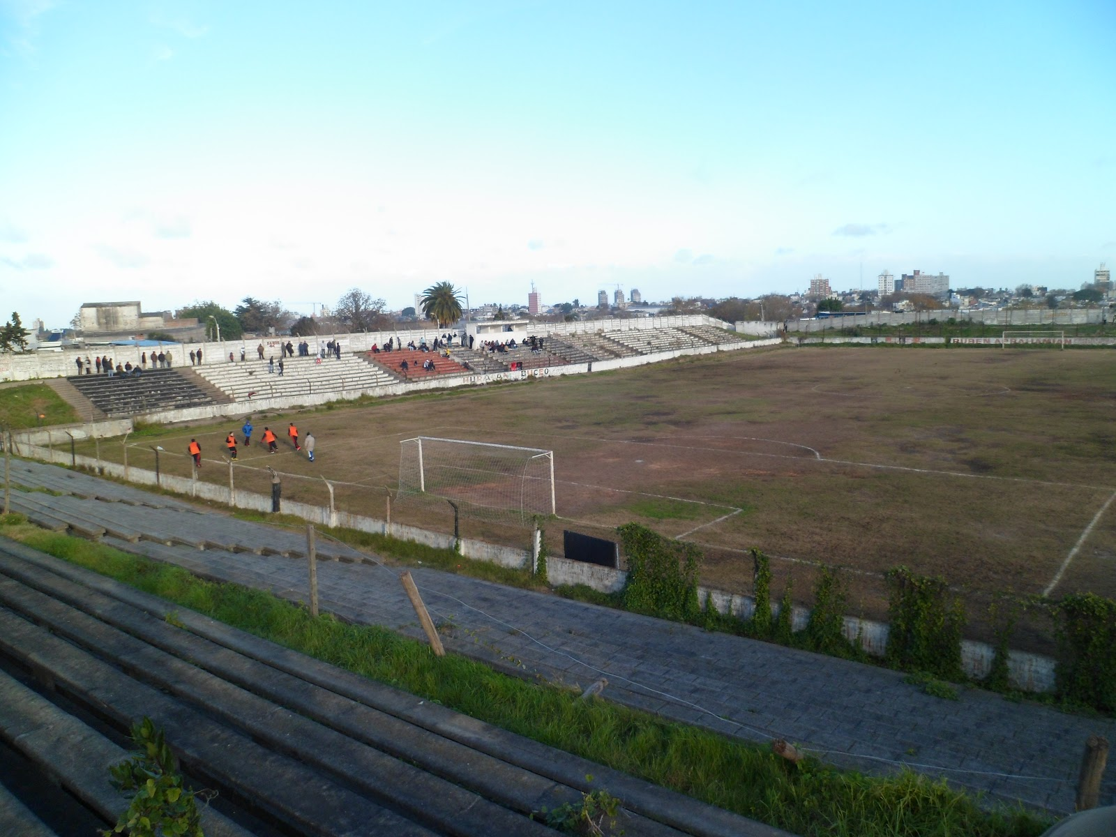 Estadio Parque Huracán en 2011